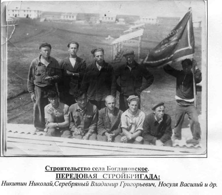 Строительство села Богдановское. Передовая стройбригада: Никитин Николай, Серебряный Владимир Григорьевич, Носуля Василий